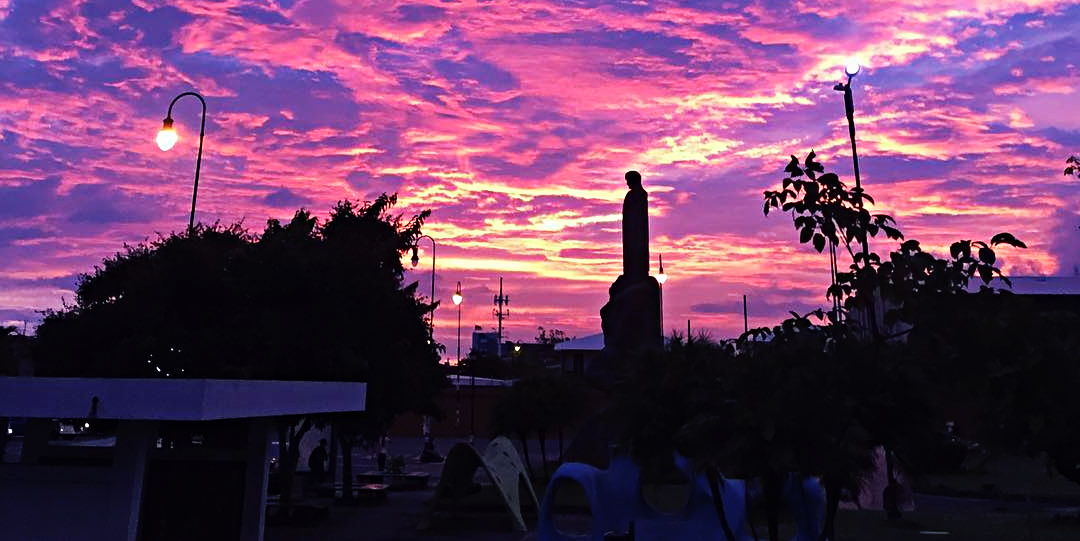 Plaza Cleto González Víquez en la ciudad de SJO, CRC.